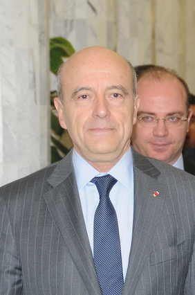 Alain Juppé, ministre français des Affaires étrangères et européennes, à Tunis